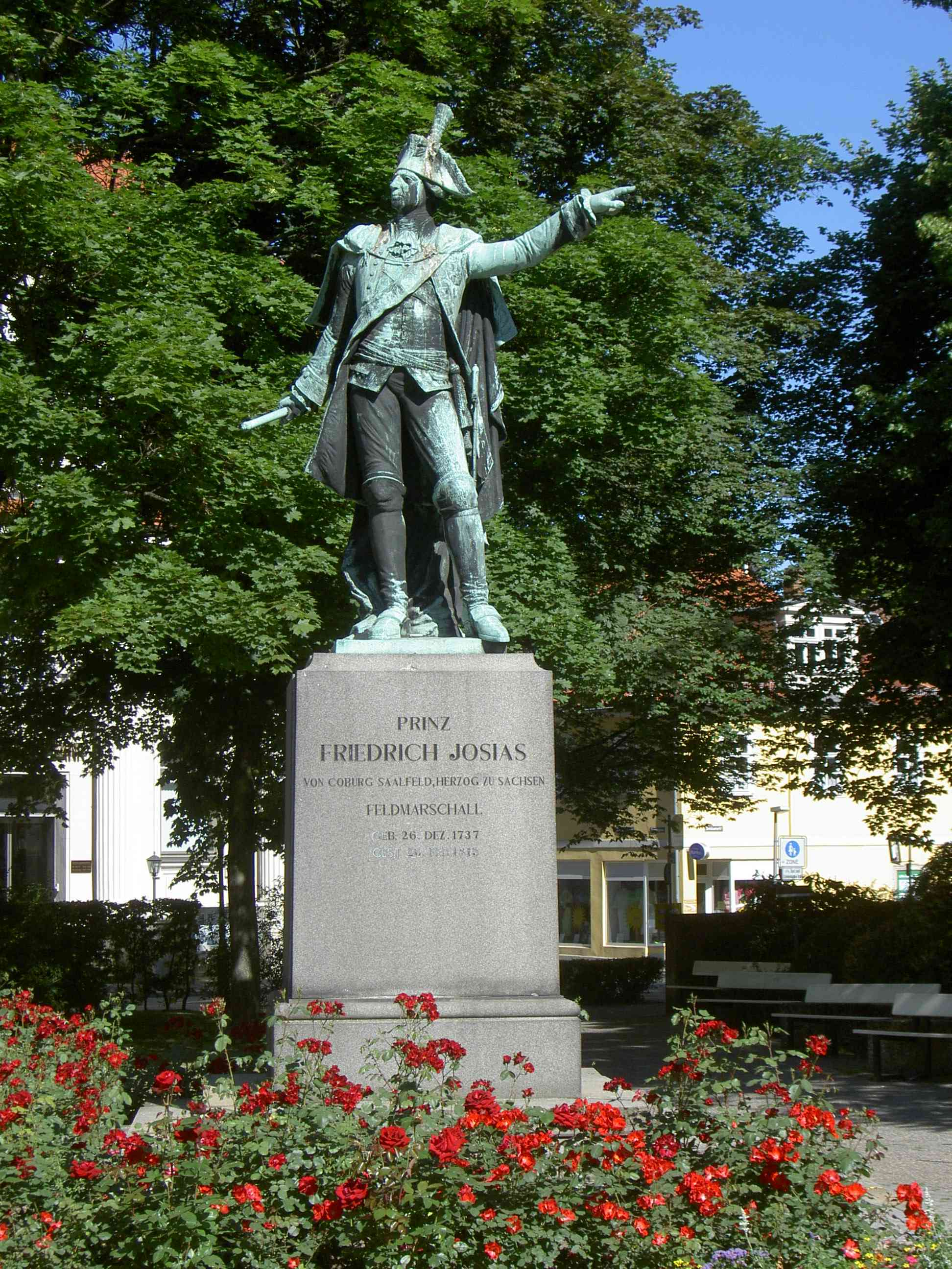 Denkmal von Friedrich Prinz Josias in Coburg (D-4-63-000-532) am 19.06.2005 fotografiert GNU FDL